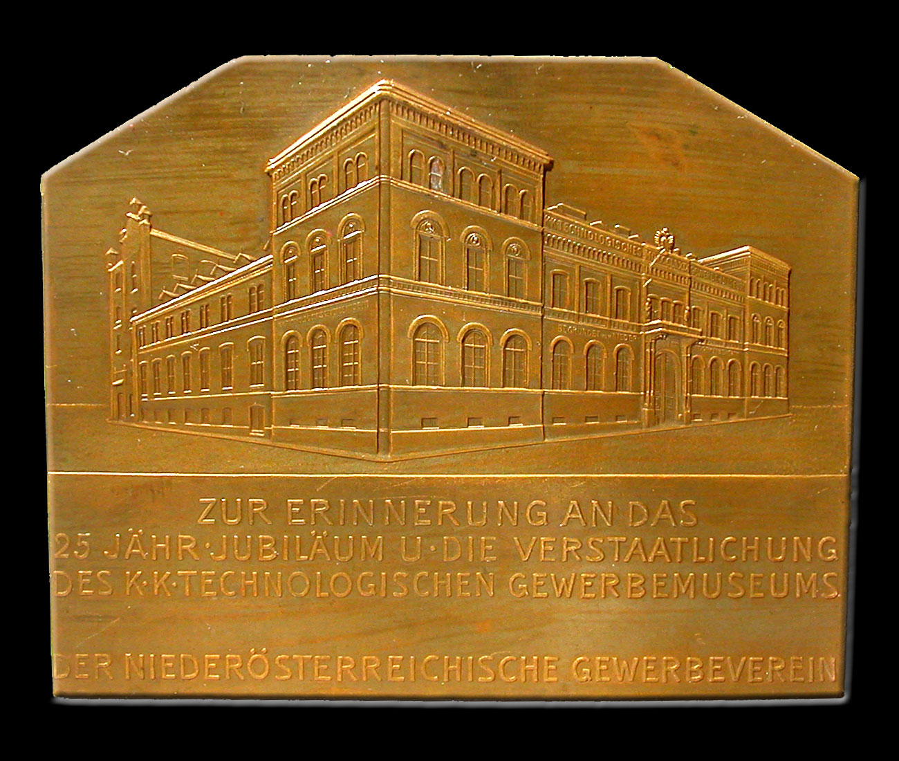 K.K. Technologisches Gewerbemuseum (altes TGM); Bezeichnet mit: "Zur Erinnerung an das 25 Jahr Jubiläum u. die Verstaatlichung des K.K. technologischen Gewerbemuseums / Der niederösterreichische Gewerbeverein" Rückseite zu